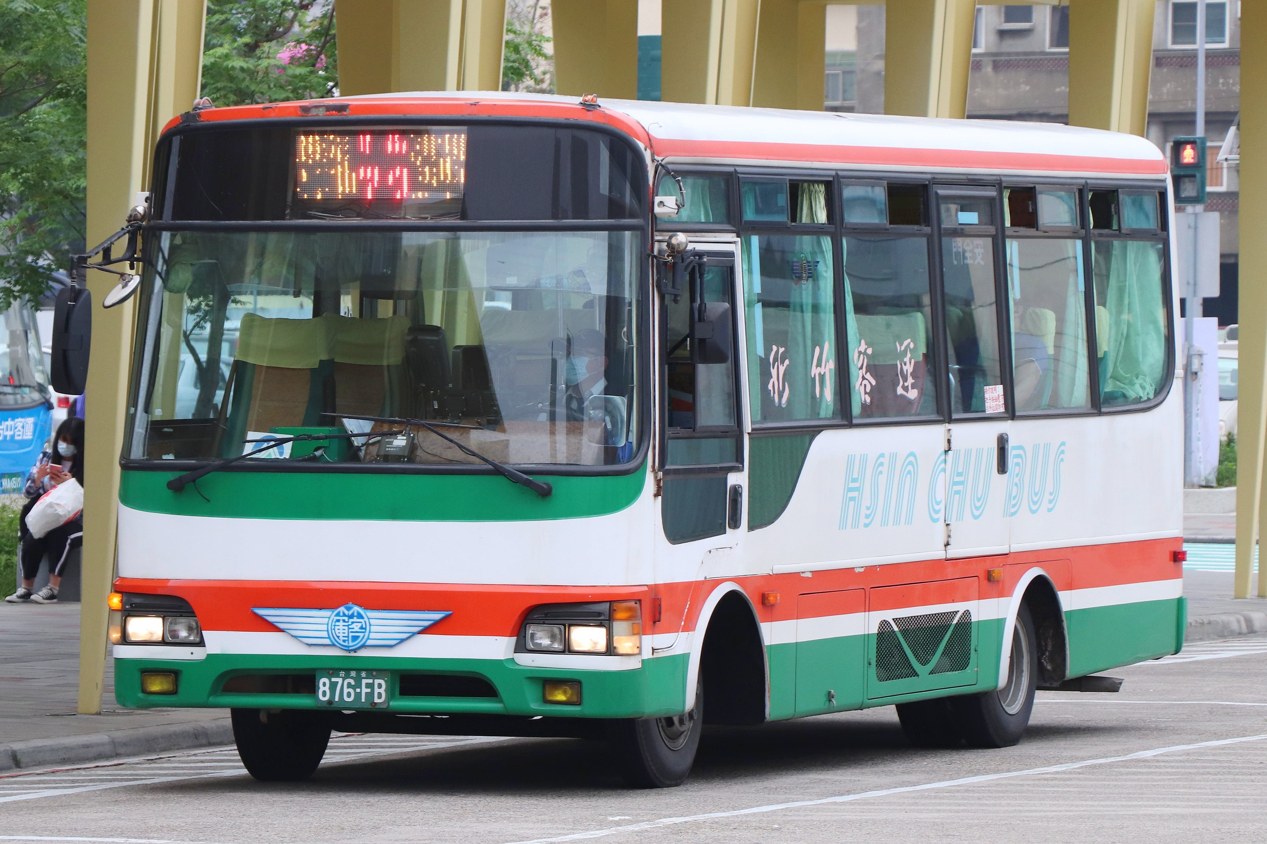 新竹客運 五十鈴NQR70PBL大客車 876-FB